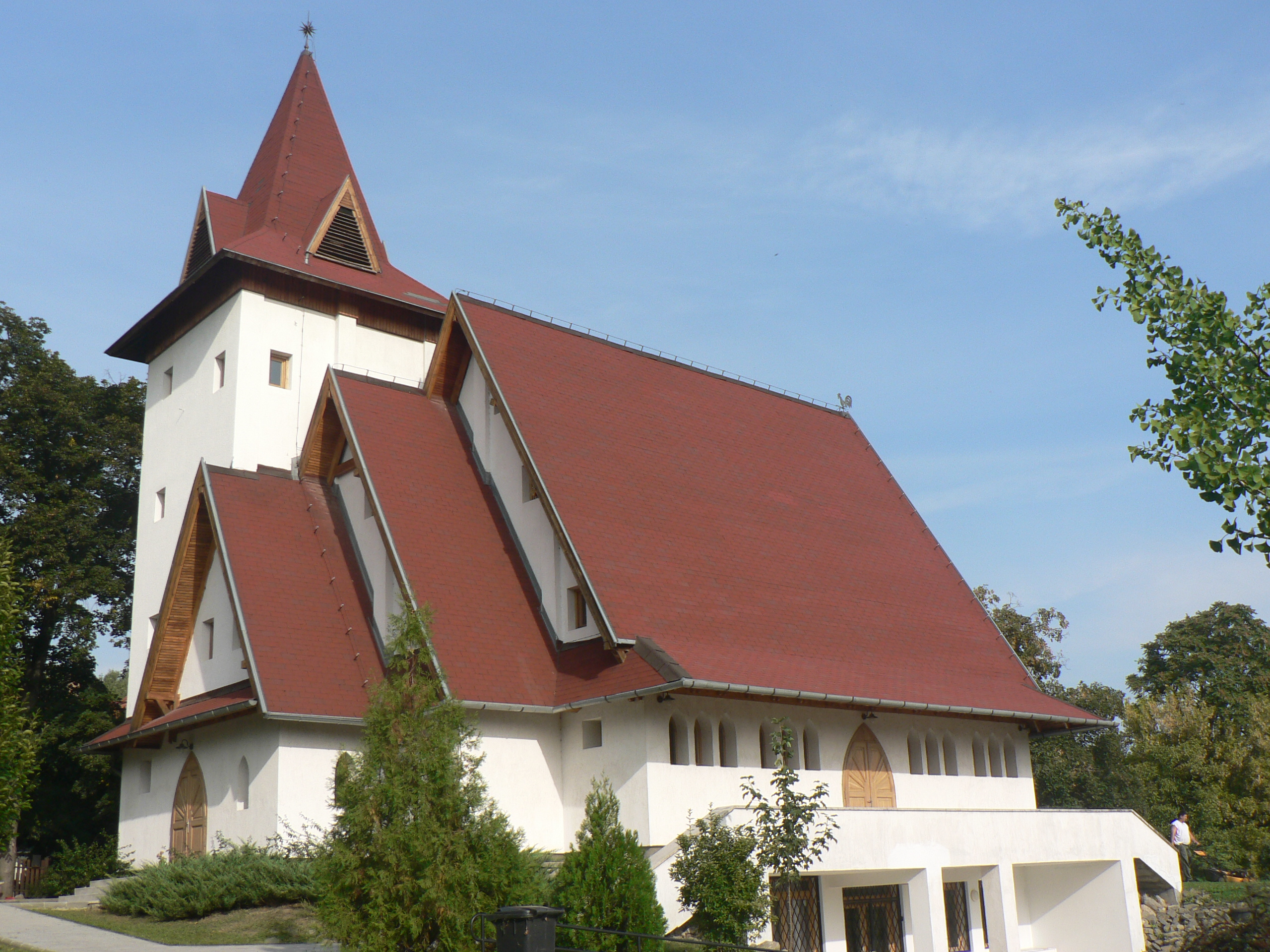 Leányfalu. Református templom. Épült Hamerli György tervei szerint, 1995–2000-ben